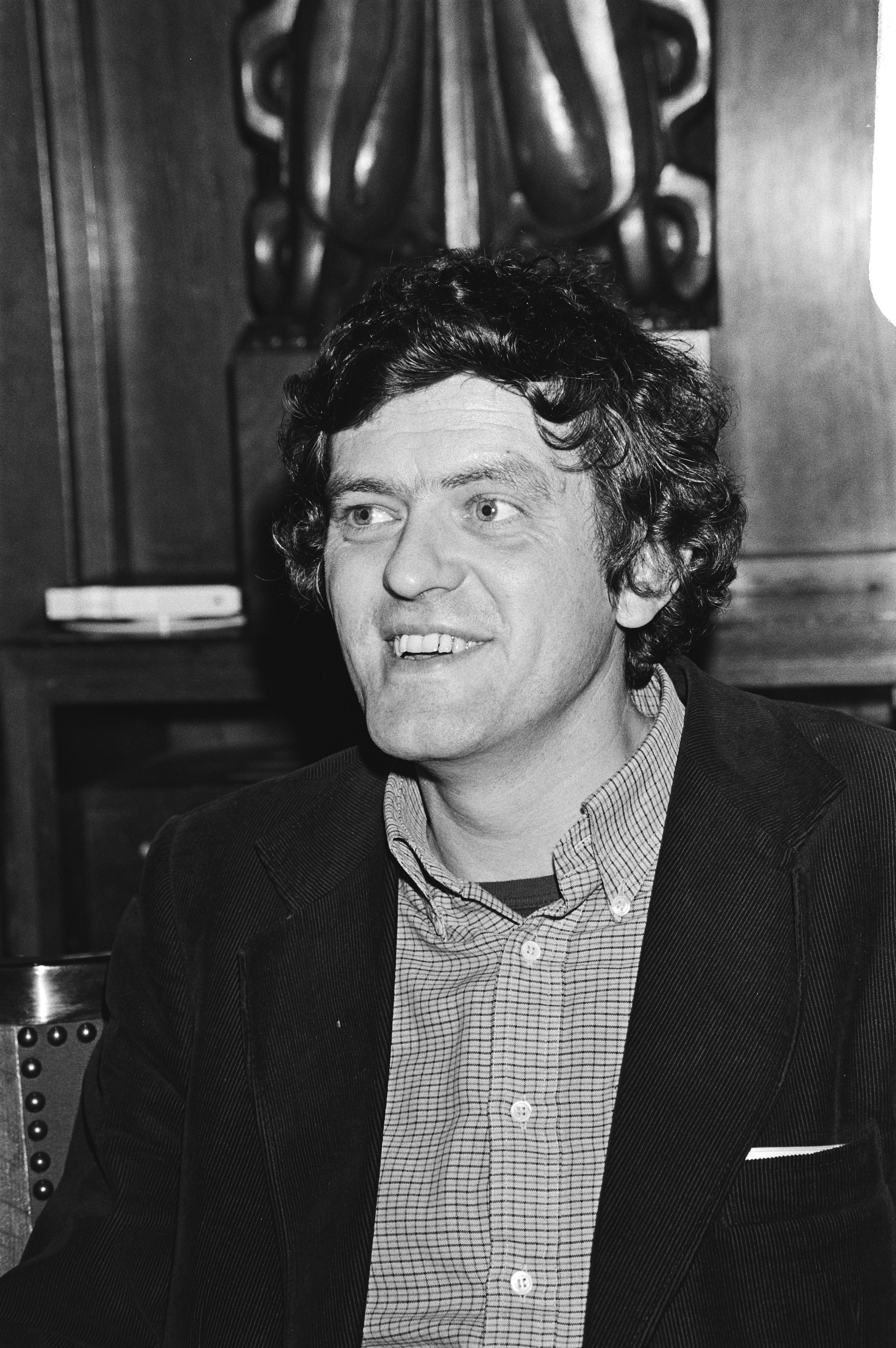 Collectie / Archief : Fotocollectie Anefo Reportage / Serie : Gemeenteraadsvergadering van Amsterdam; Evert van der Wall (PvdA) benoemd tot negende wethouder Beschrijving : Van der Wall is de opvolger van de afgetreden wethouder van der Velde (CPN) Annotatie : Randnummers negatiefstrook: no. 9 : wethouder Kuijpers Datum : 24 oktober 1979 Locatie : Amsterdam, Noord-Holland Trefwoorden : gemeentebesturen, portretten, wethouders Persoonsnaam : Wall, Evert van der Fotograaf : Dijk, Hans van / Anefo Auteursrechthebbende : Nationaal Archief Materiaalsoort : Negatief (zwart/wit) Nummer archiefinventaris : bekijk toegang 2.24.01.05 Bestanddeelnummer : 930-5071